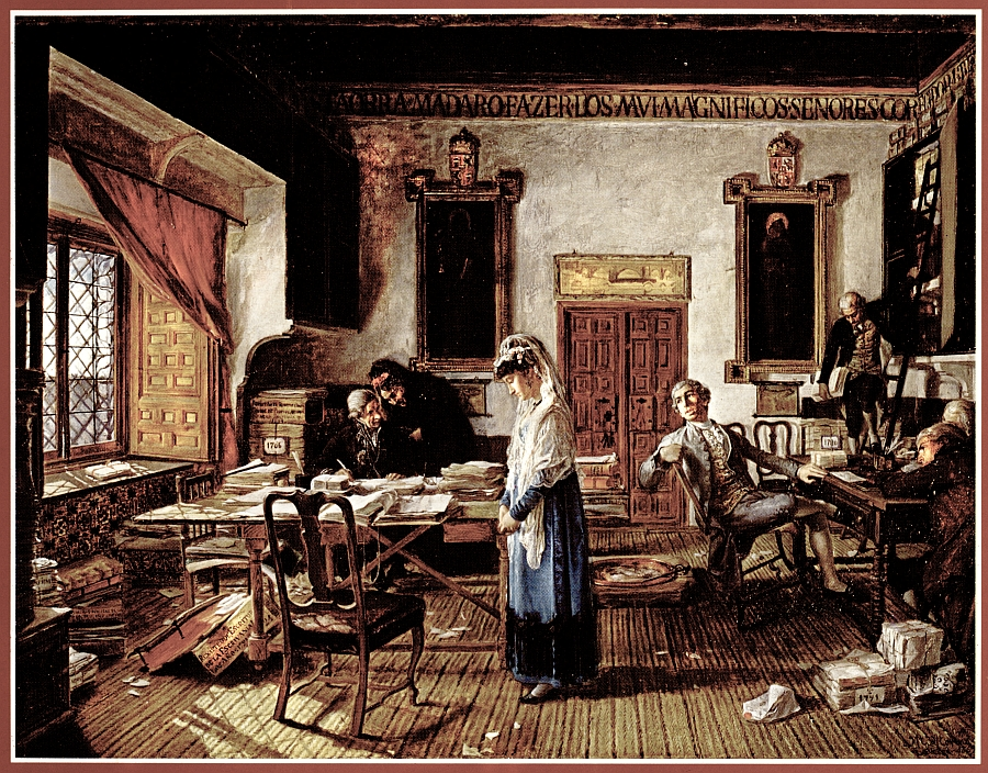 Pintura de Matías Moreno